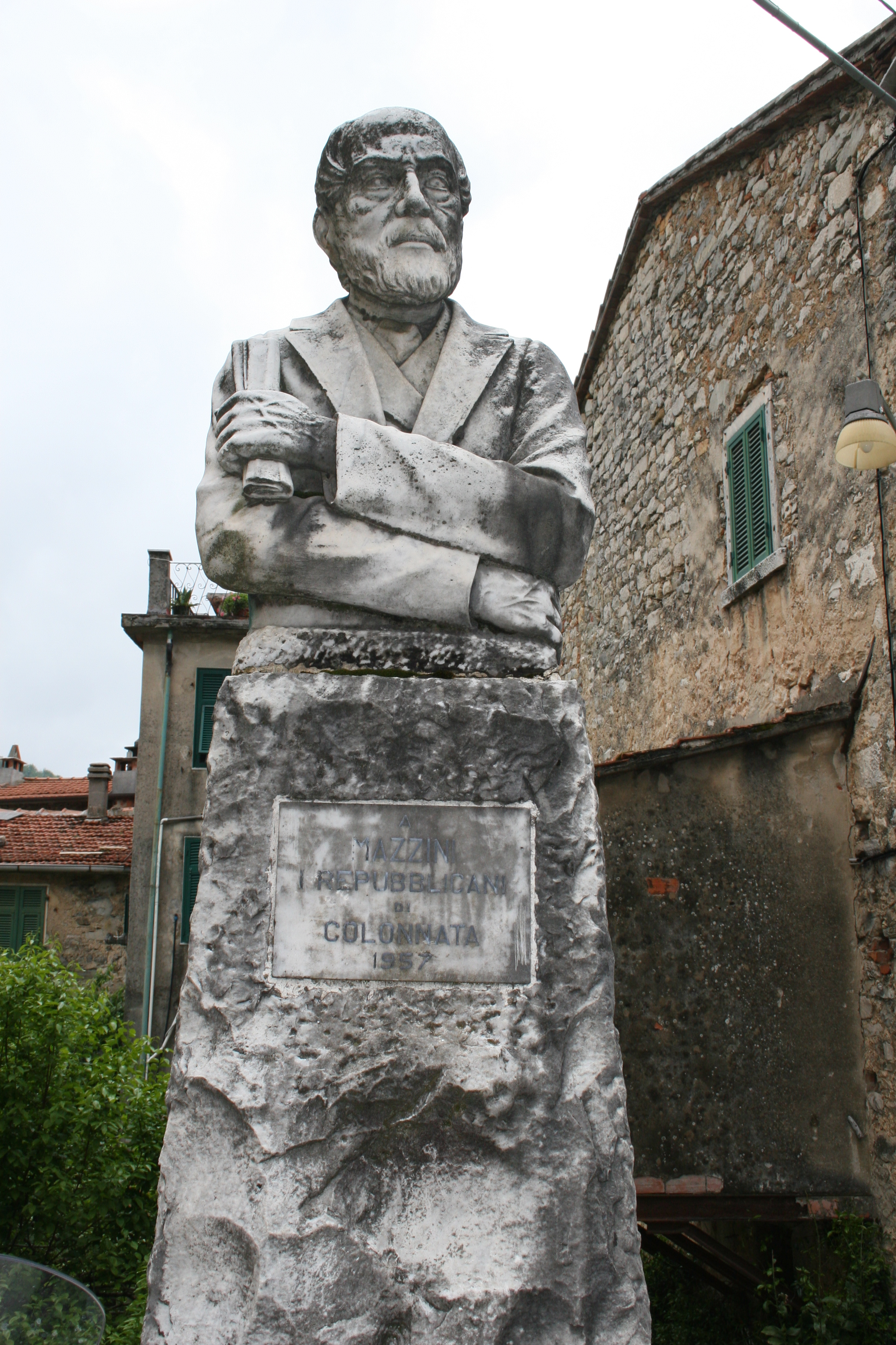 Guiseppe Mazzini, Marmorbüste des italienischen Freiheitshelden in Colonnata in Italien.